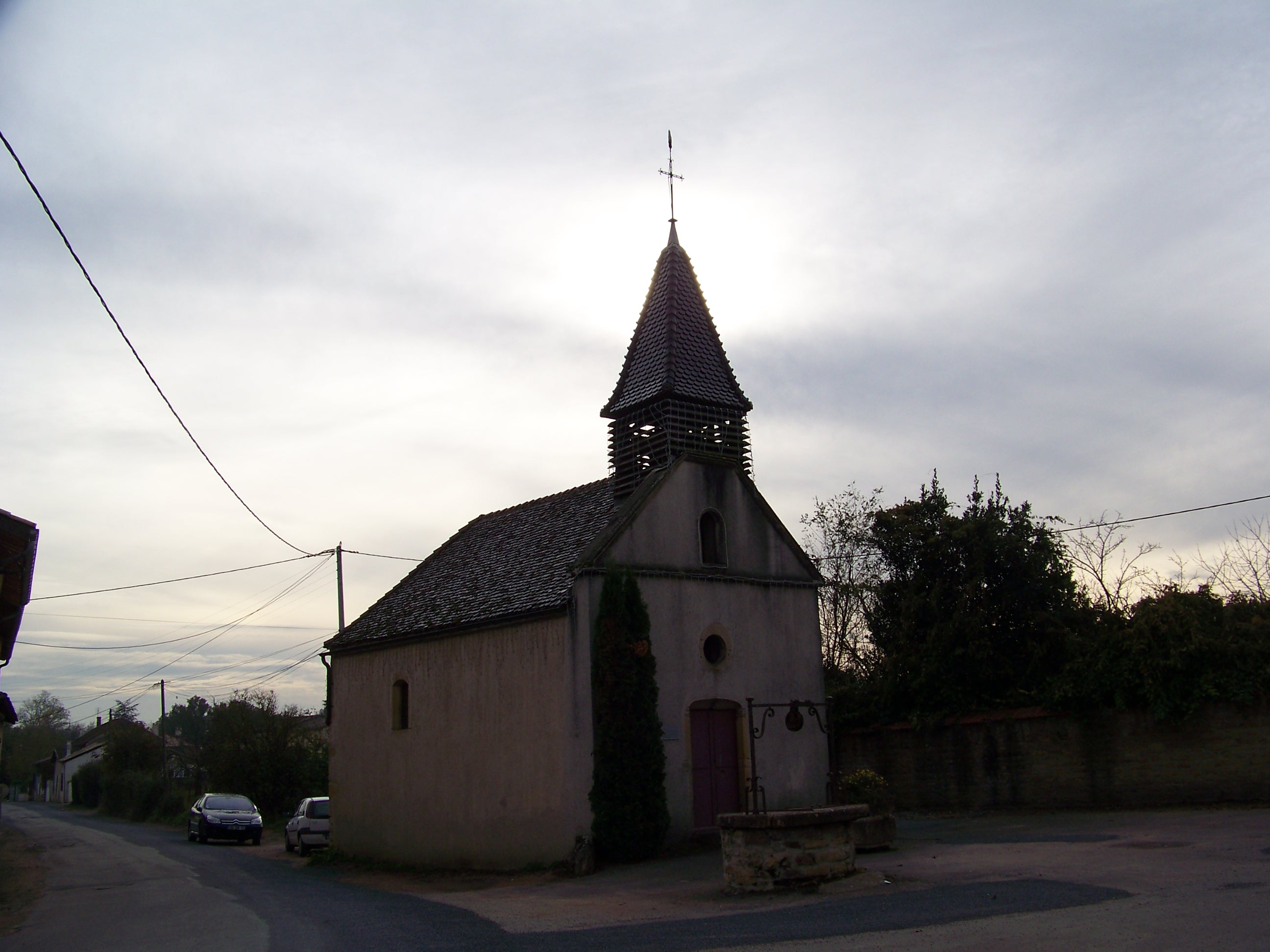 la vielle Chapelle au hameau de Dracè.